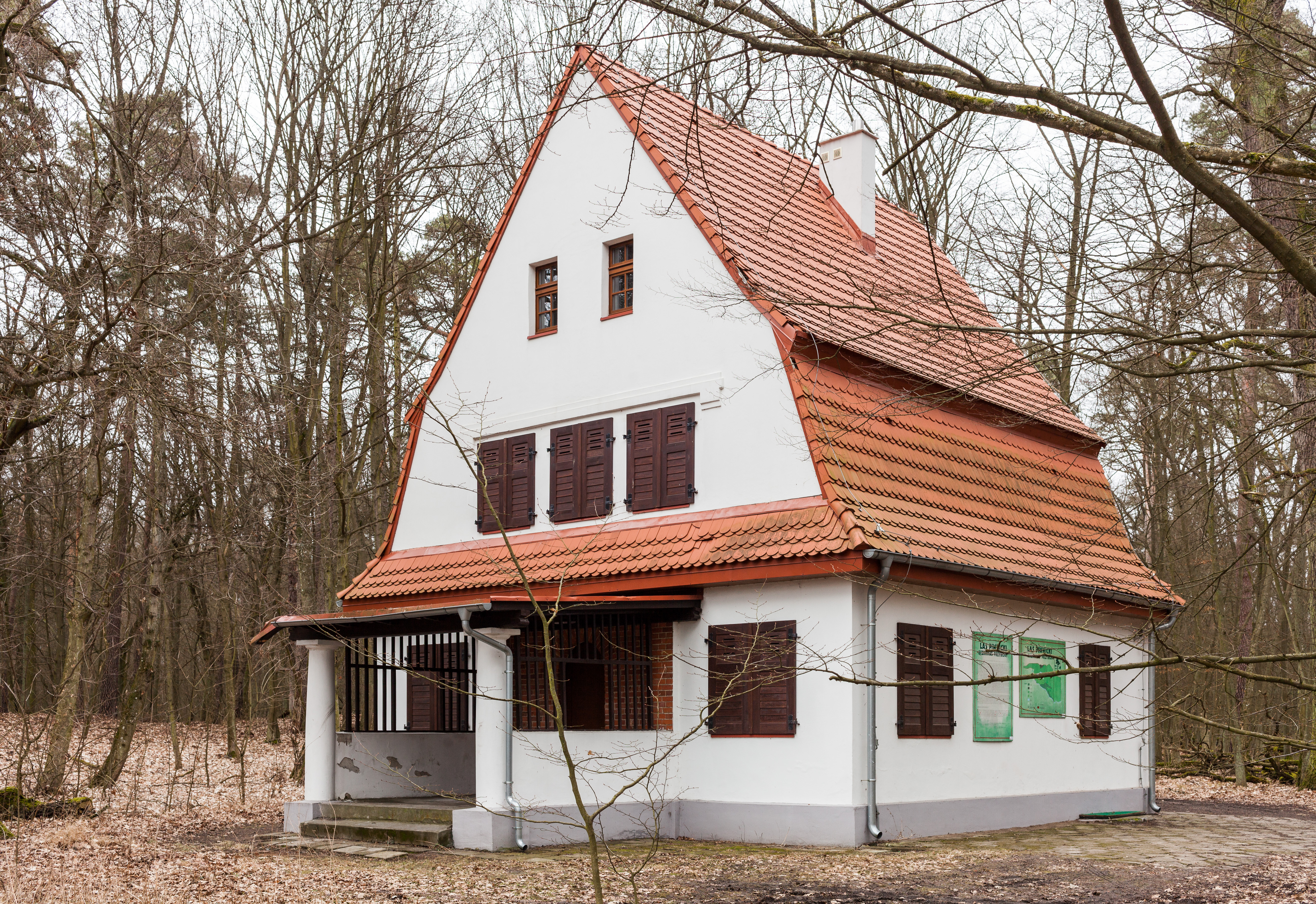 Stacja ekologiczna UMK w rezerwacie przyrody Las Piwnicki k. Torunia.